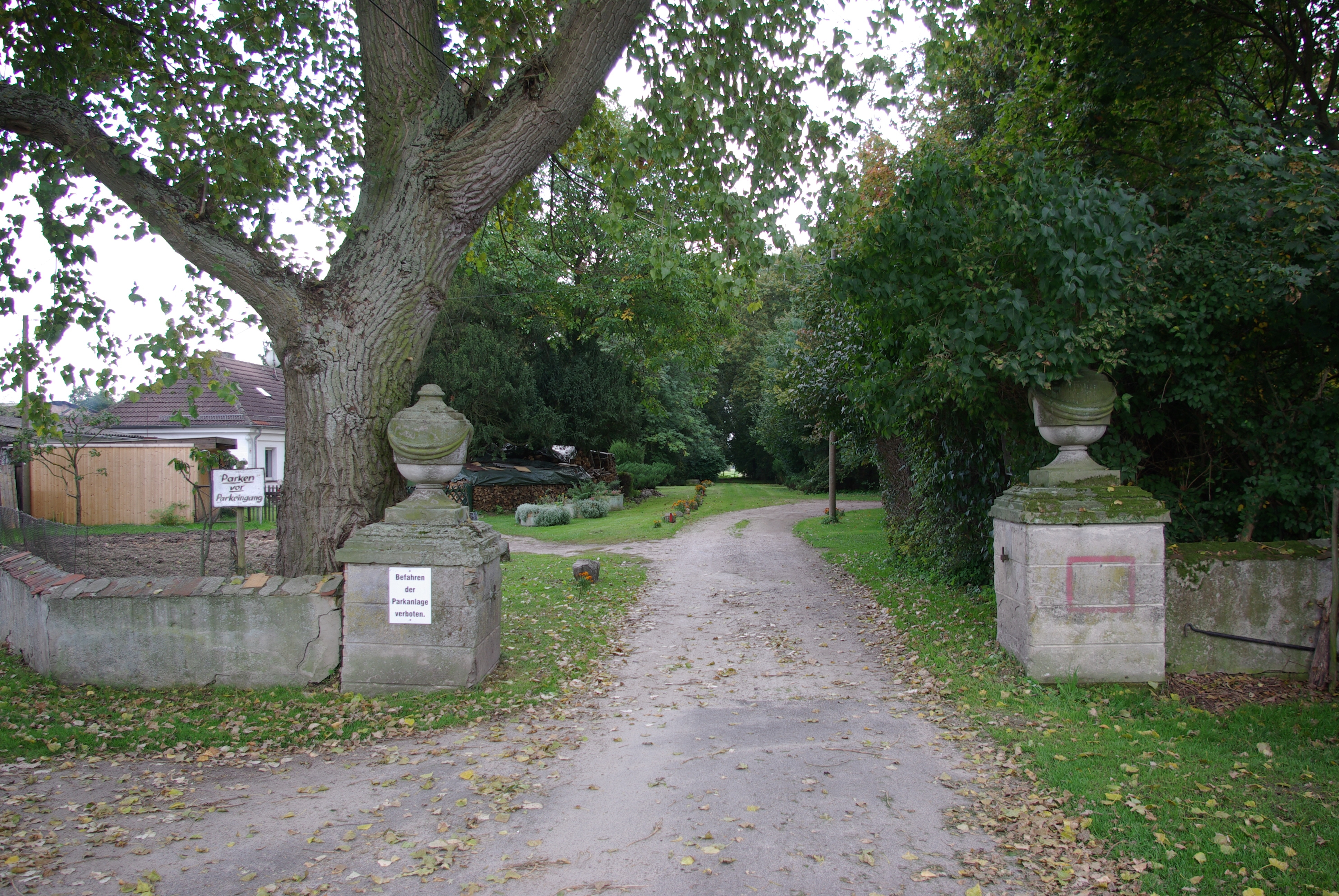 Wriezen Ortsteil Jäckelsbruch. Das alte Rittegut Jäckelsbruck ist denkmalgeschützt. Hier das Tor zur Einfahrt in den Park.